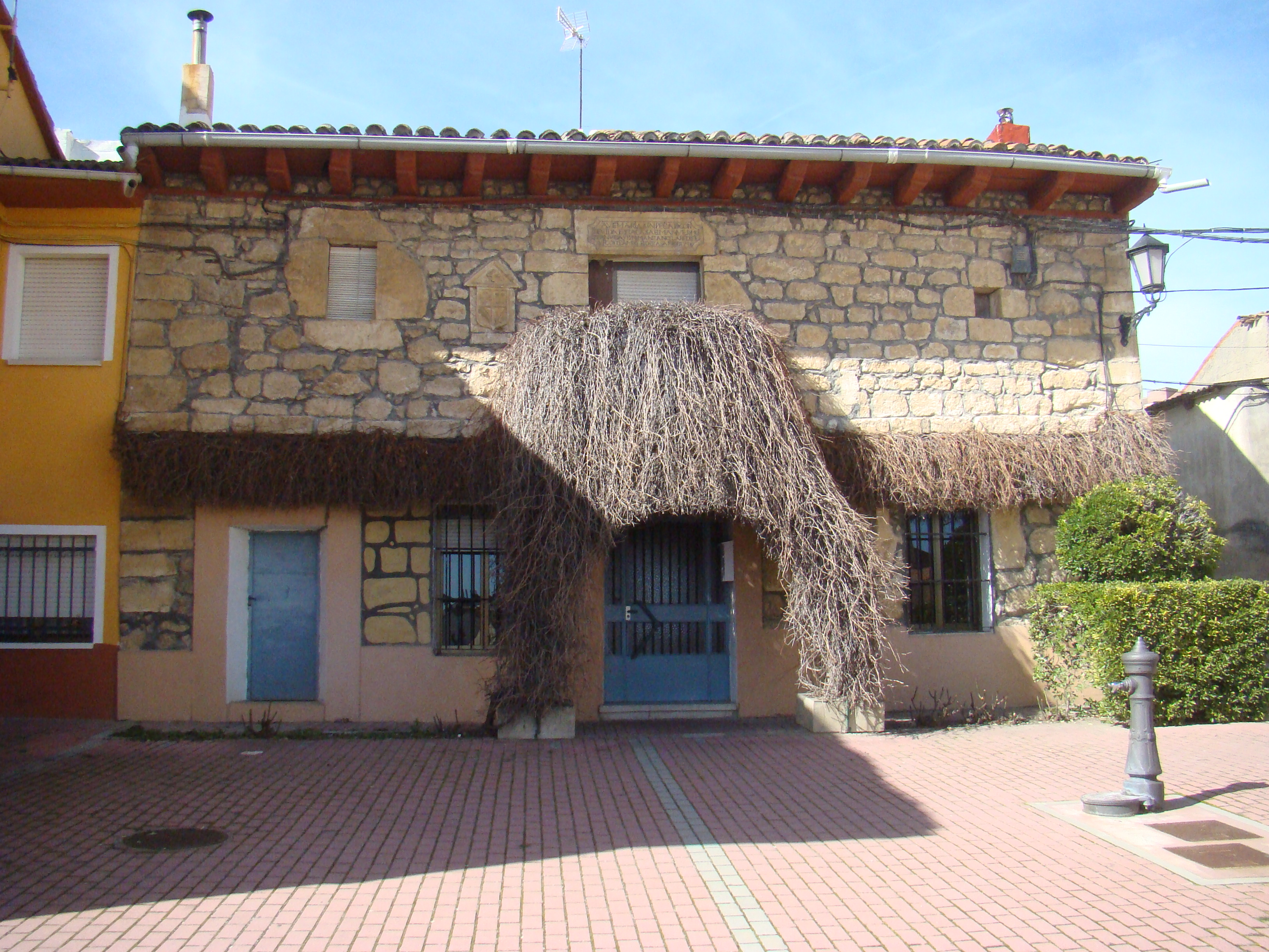 Zaratán, Valladolid (España). Casa que perteneció probablemente a un familiar del Santo Oficio a juzgar por el emblema que ostenta. Está situada en la acera de la plaza Mayor que en tiempos anteriores era la continuación de la calle del Pozo.